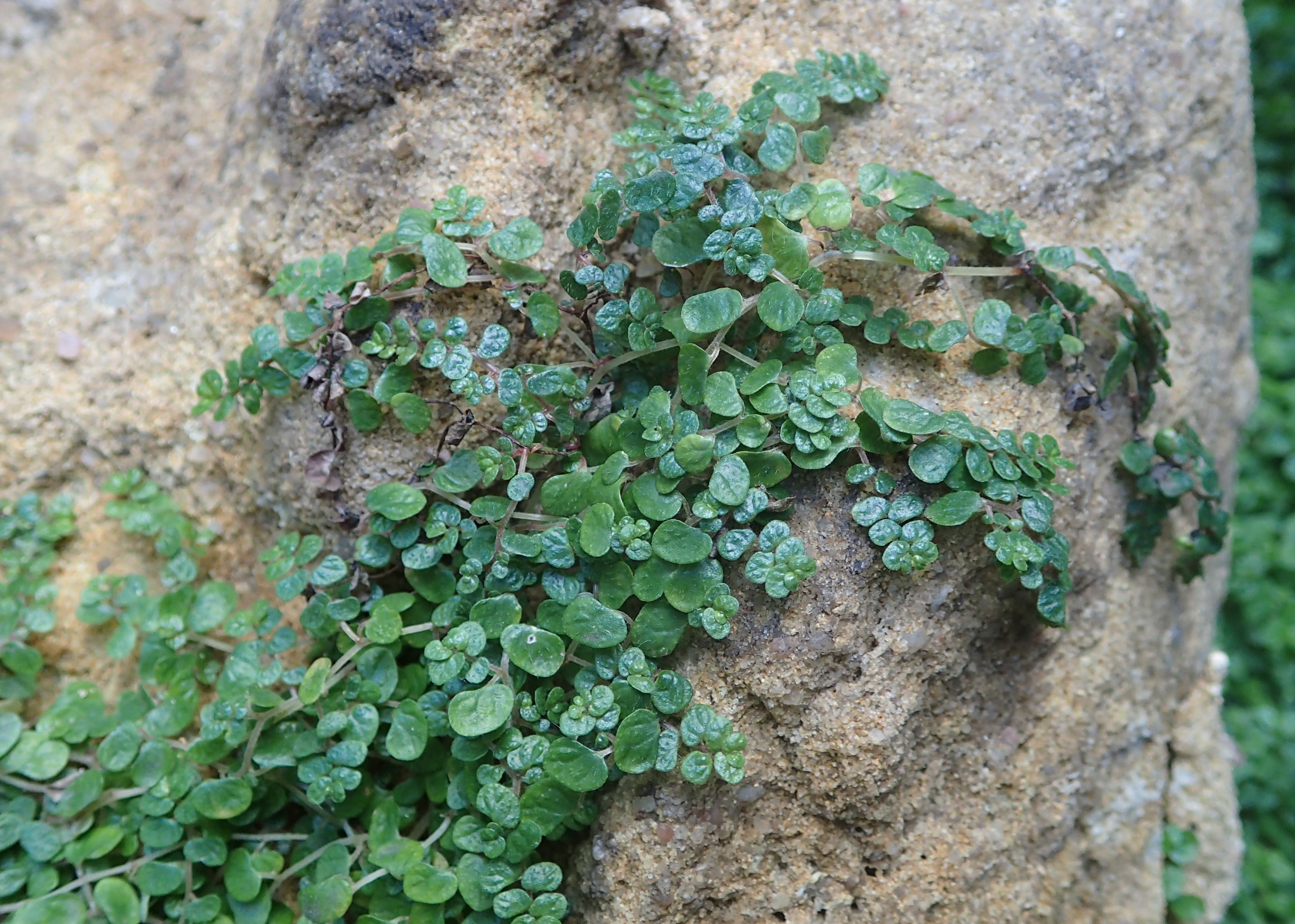 Soleirolia soleirolii in botanical garden in Kraków